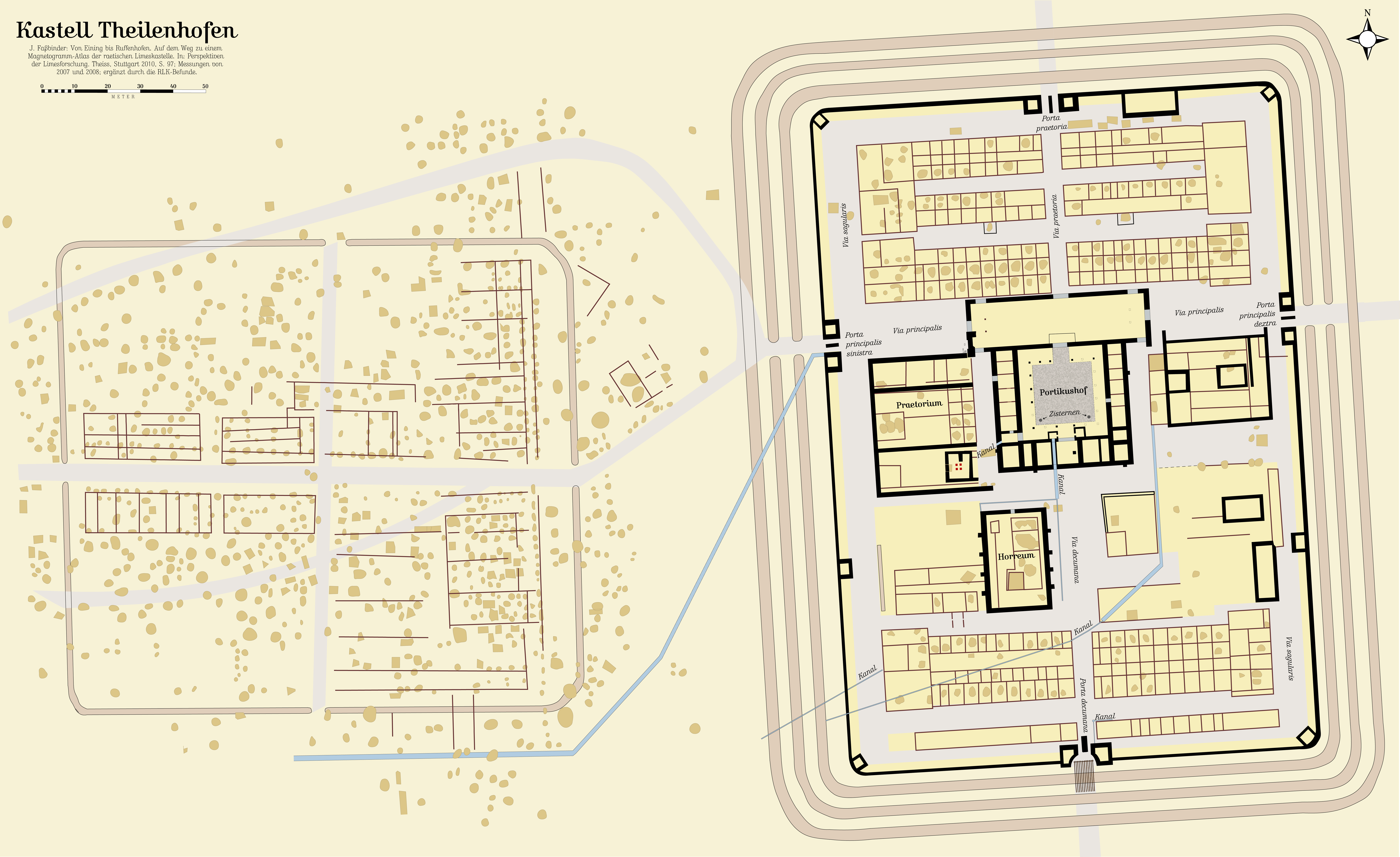 Kastell Theilenhofen (Iciniacum) mit dem Holz-Erde-Lager nach den zwischen 1879 und 1895 erschlossenen Befunden sowie den Magnetometermessungen 2007 und 2008. Siehe dazu die in der Datei direkt angegebenen Quellen.